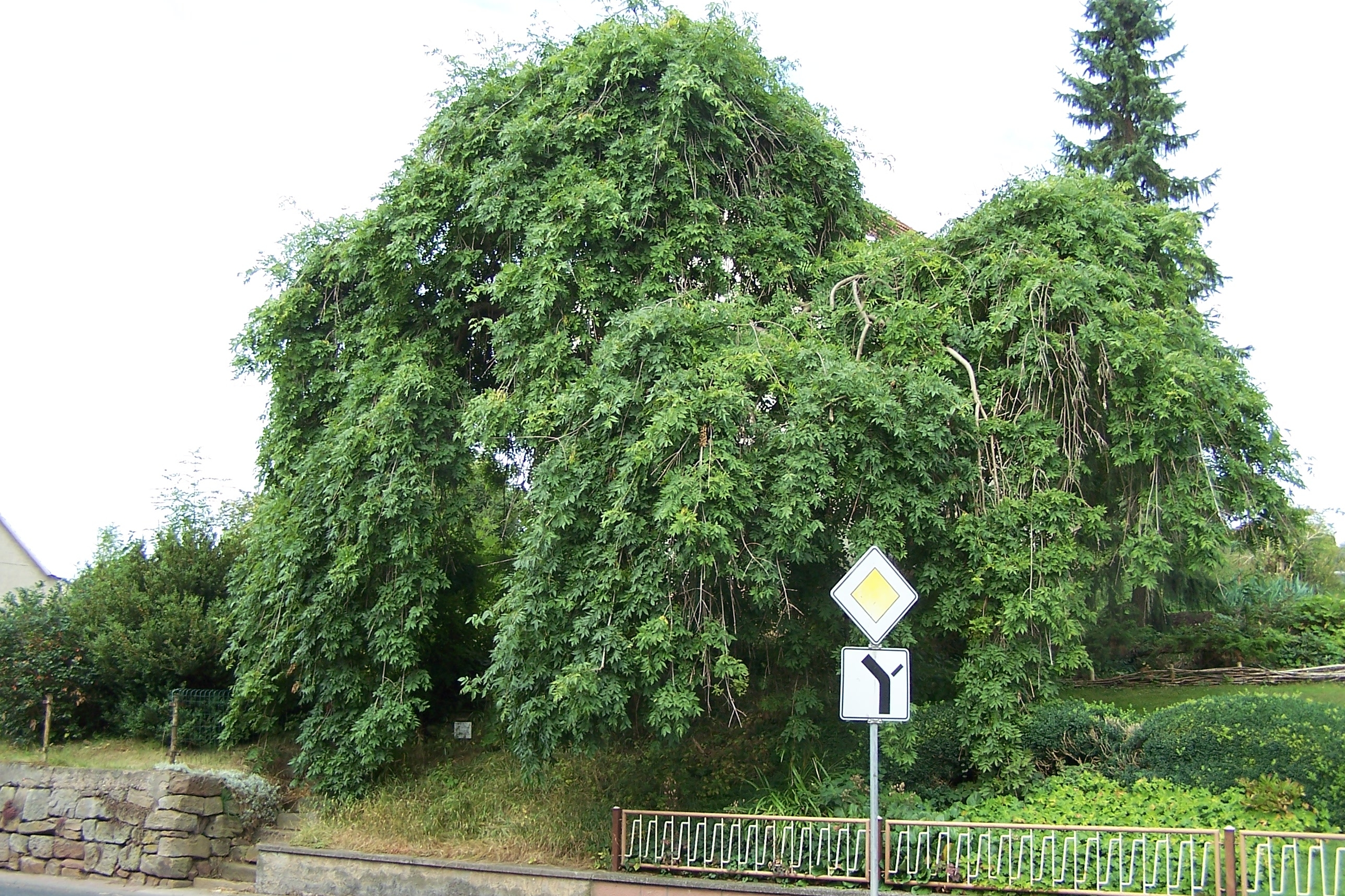 Gehaus